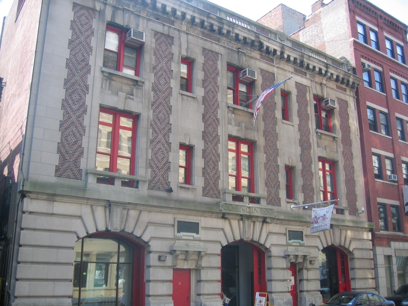 Salle en mémoire des pompiers victimes de leur devoir le 11 septembre 2001